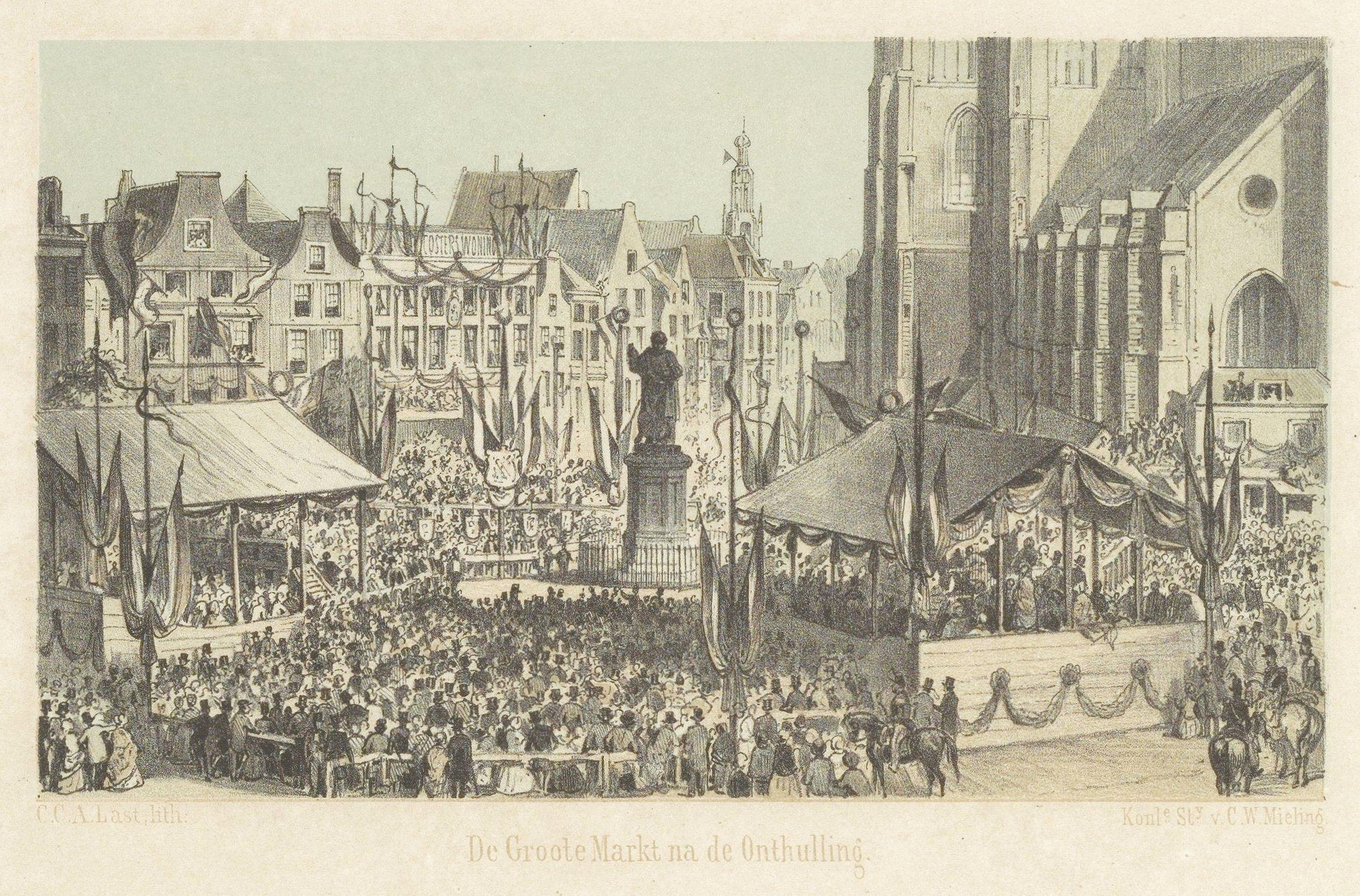 Lithografie van de onthulling van het standbeeld van Laurens Janszoon Coster (1856) van C.C.A. Last